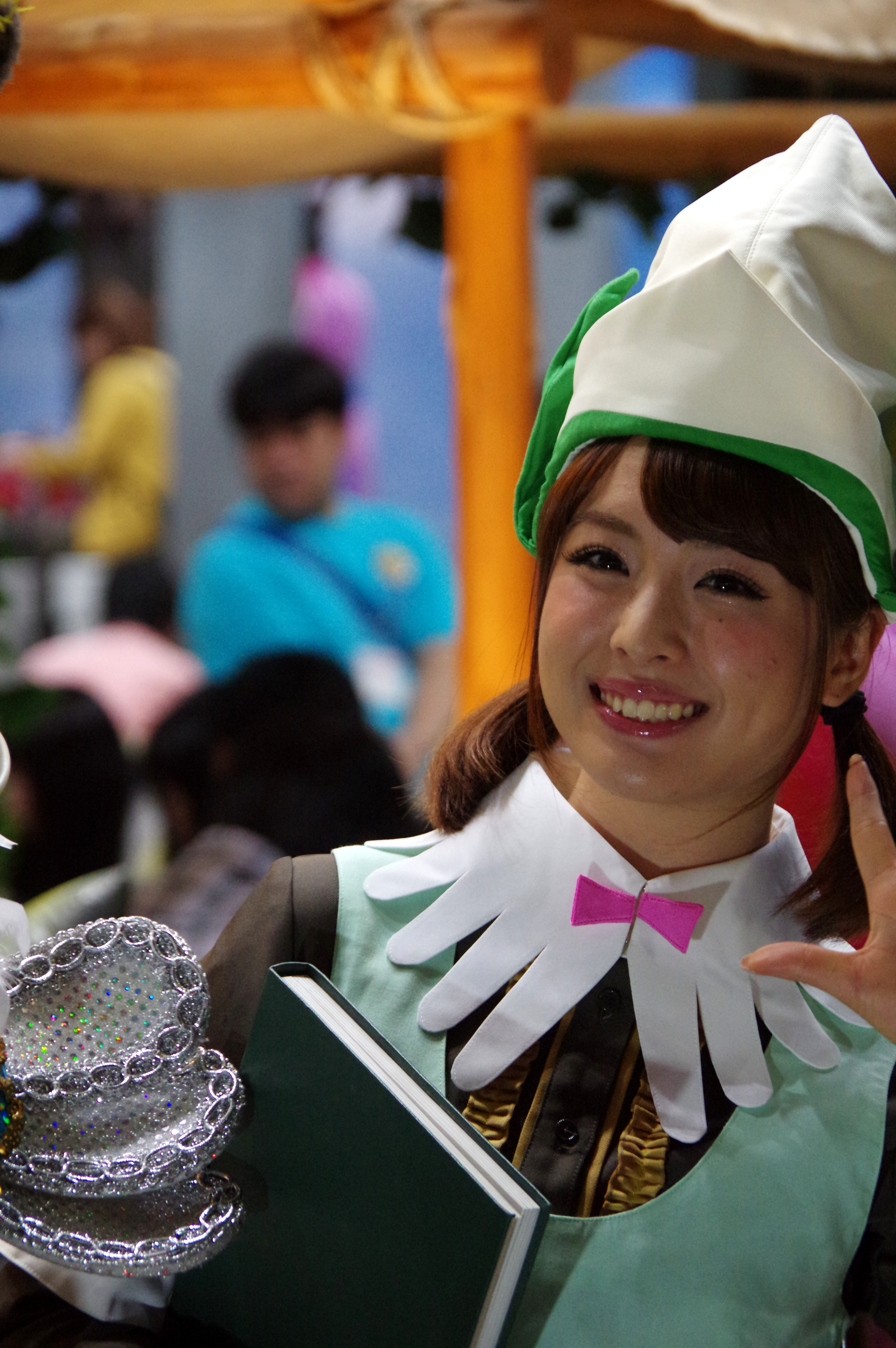 TOKYO GAME SHOW 2014_039 森谷まりん